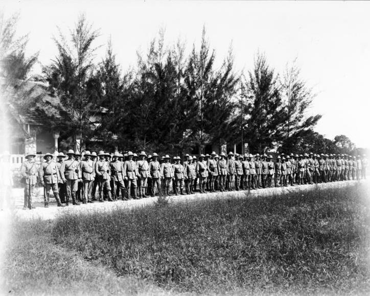 Landsturm angetreten